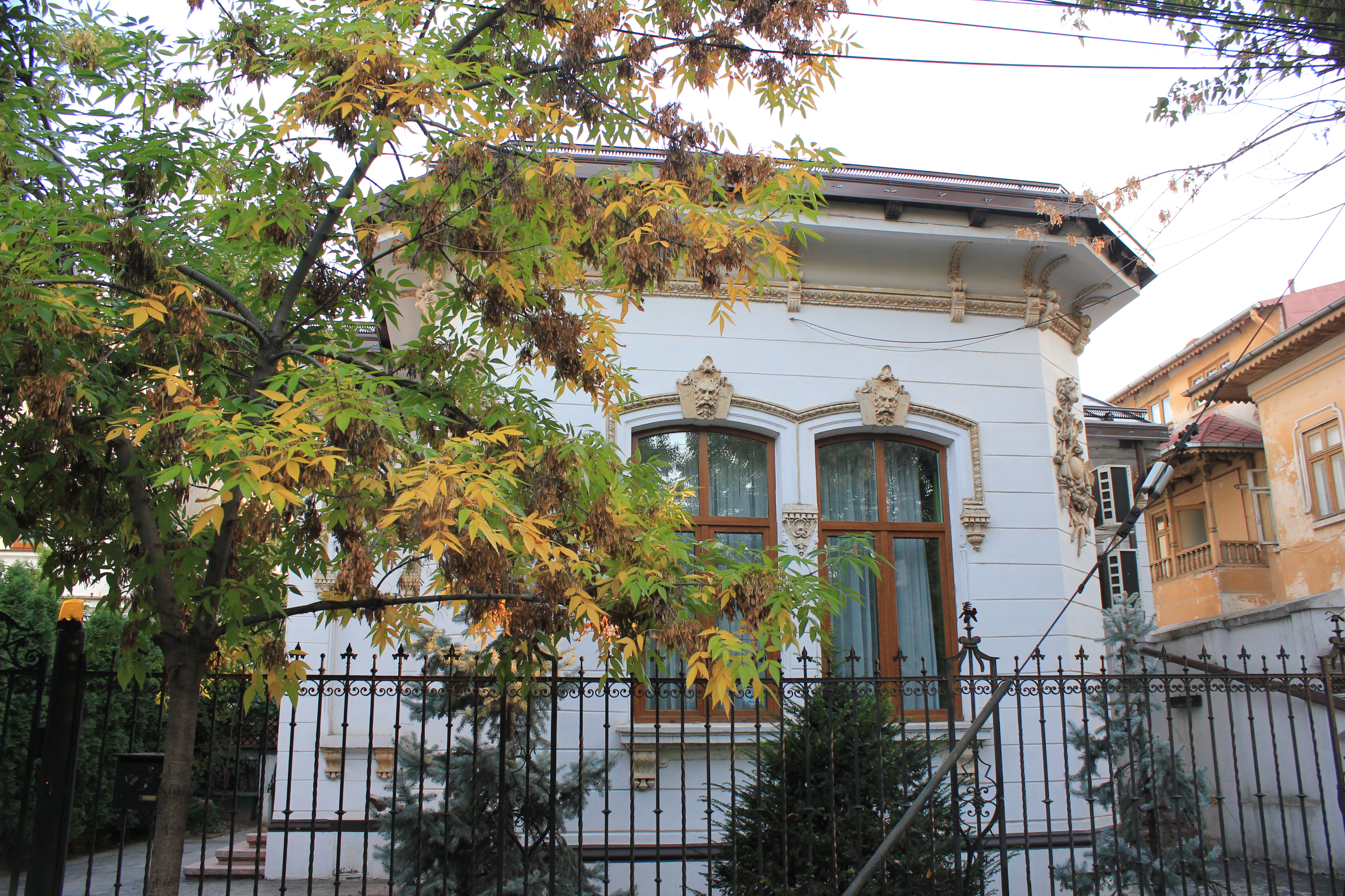 Casă Plantelor 48